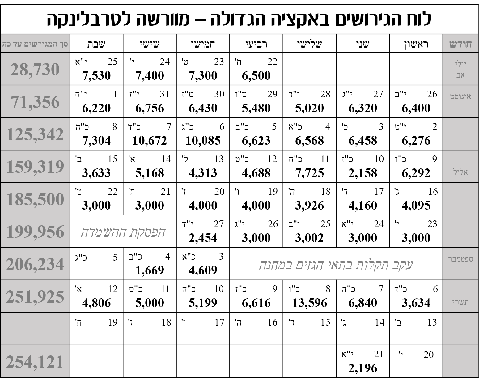 מבוסס לפי המידע באתר